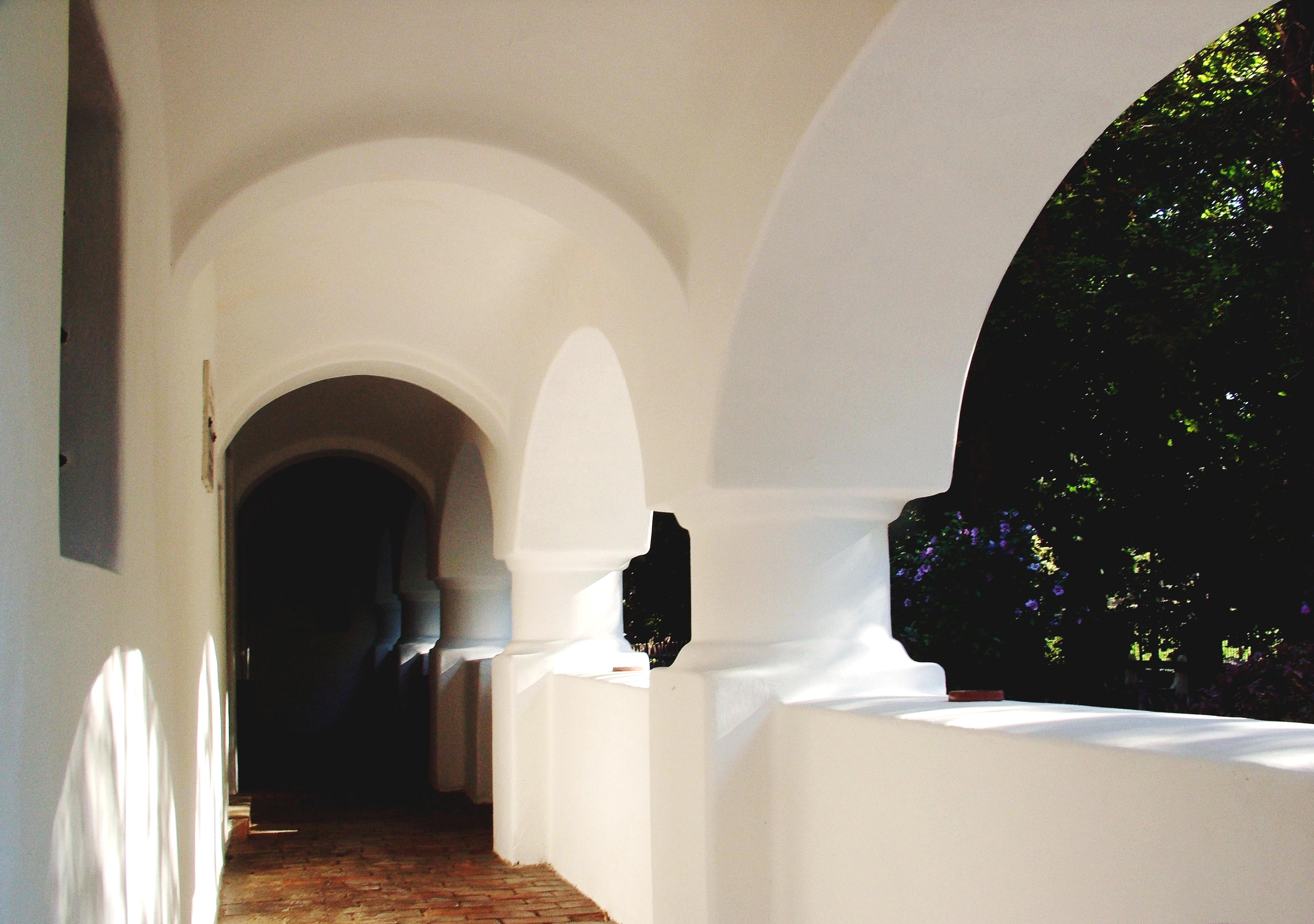 Bakonyi Ház, Veszprém